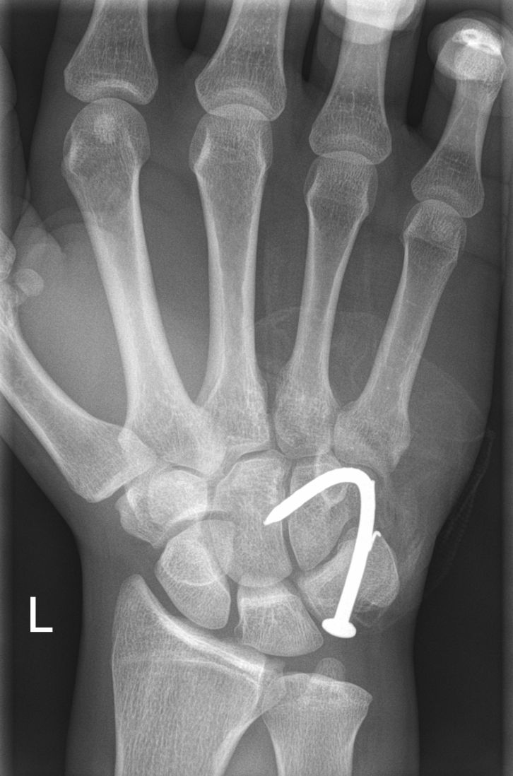 Nagel von Schussapparat (Druckluftnagler) in der Hand: Röntgenbild ap.